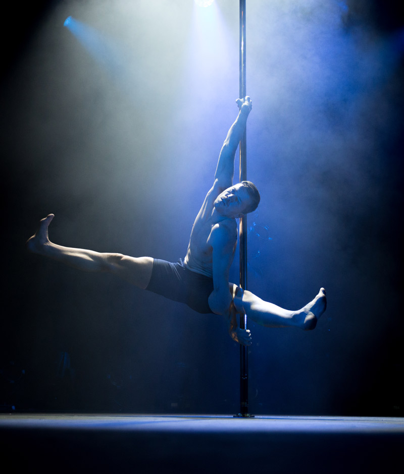 Championnat-France-Pole-Dance-2017-037- Slava Ruza